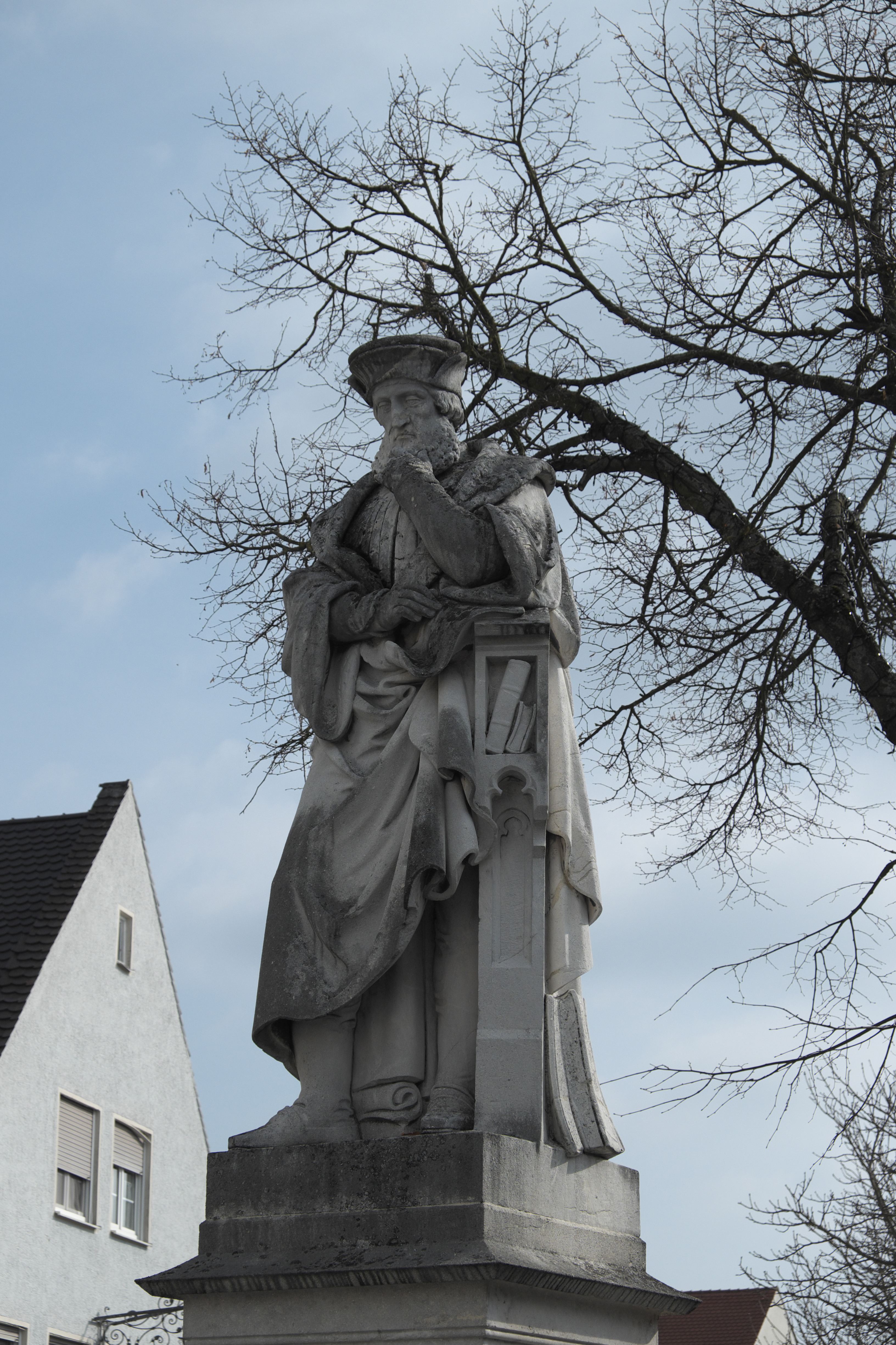 Denkmal für Johannes Aventinus in Abensberg im Landkreis Kelheim in Niederbayern (Bayern)